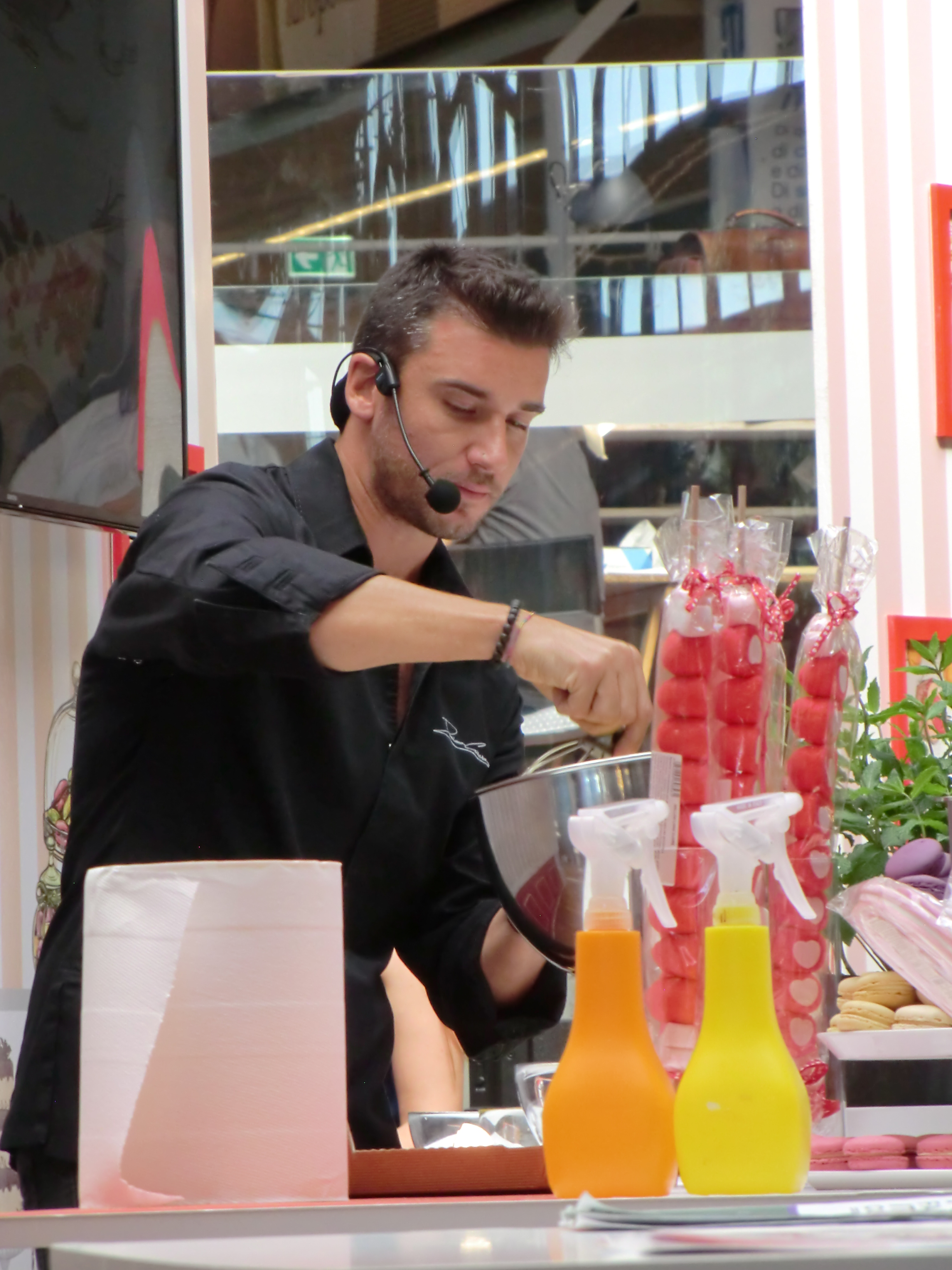 Damiano Carrara durante un evento tenutosi nel Parco AgroAlimentare FICO di Bologna.